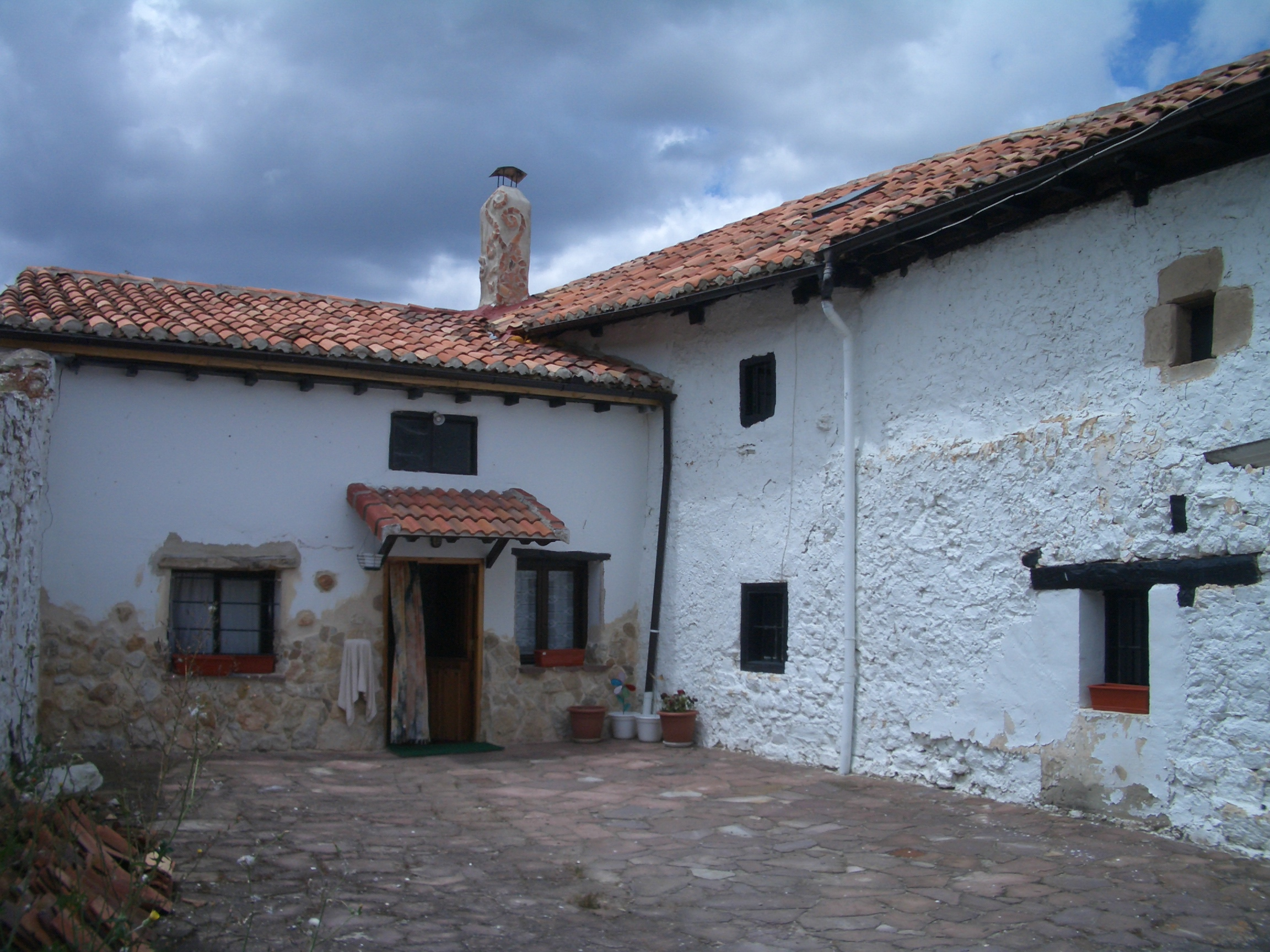 El Patio